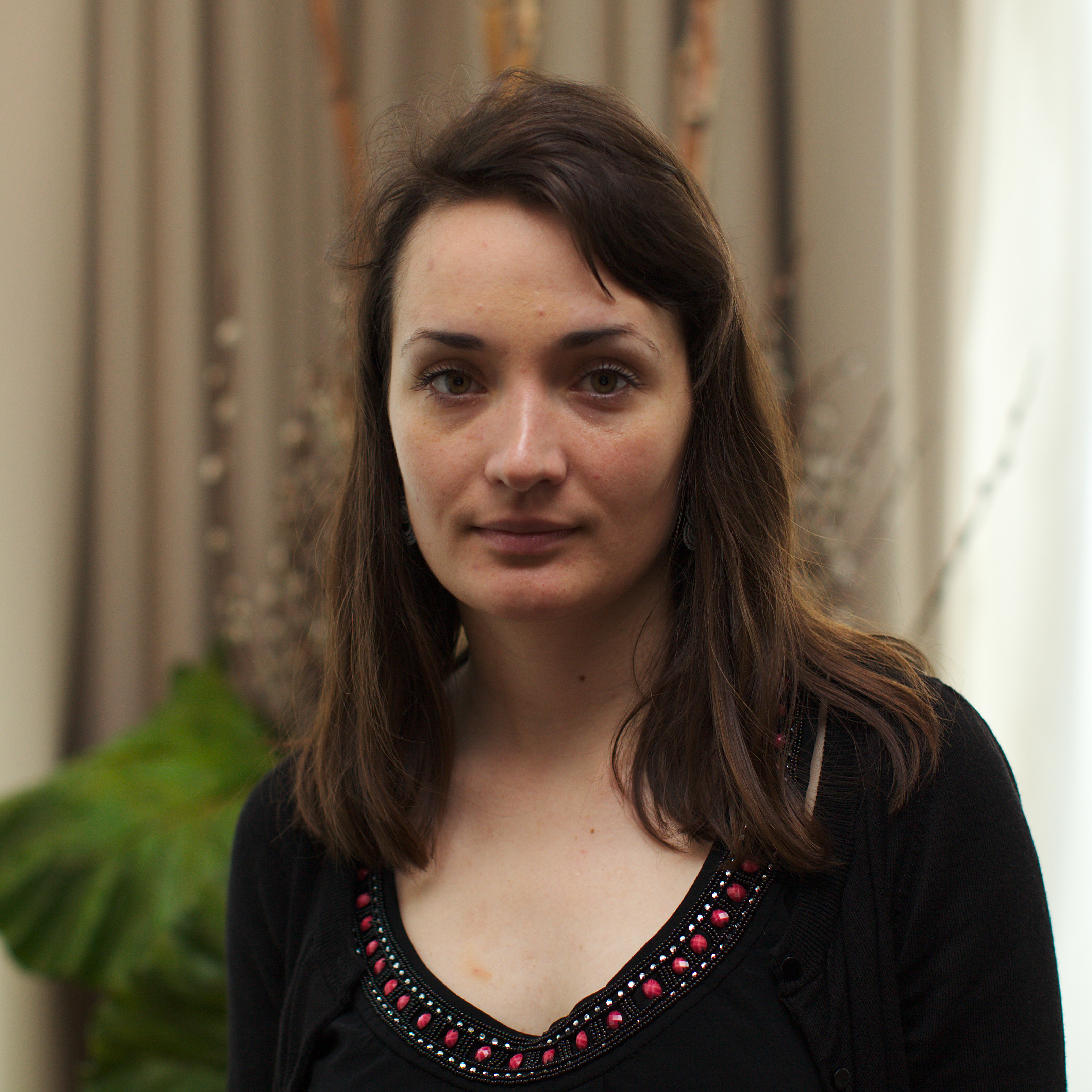 Kateryna Lagno